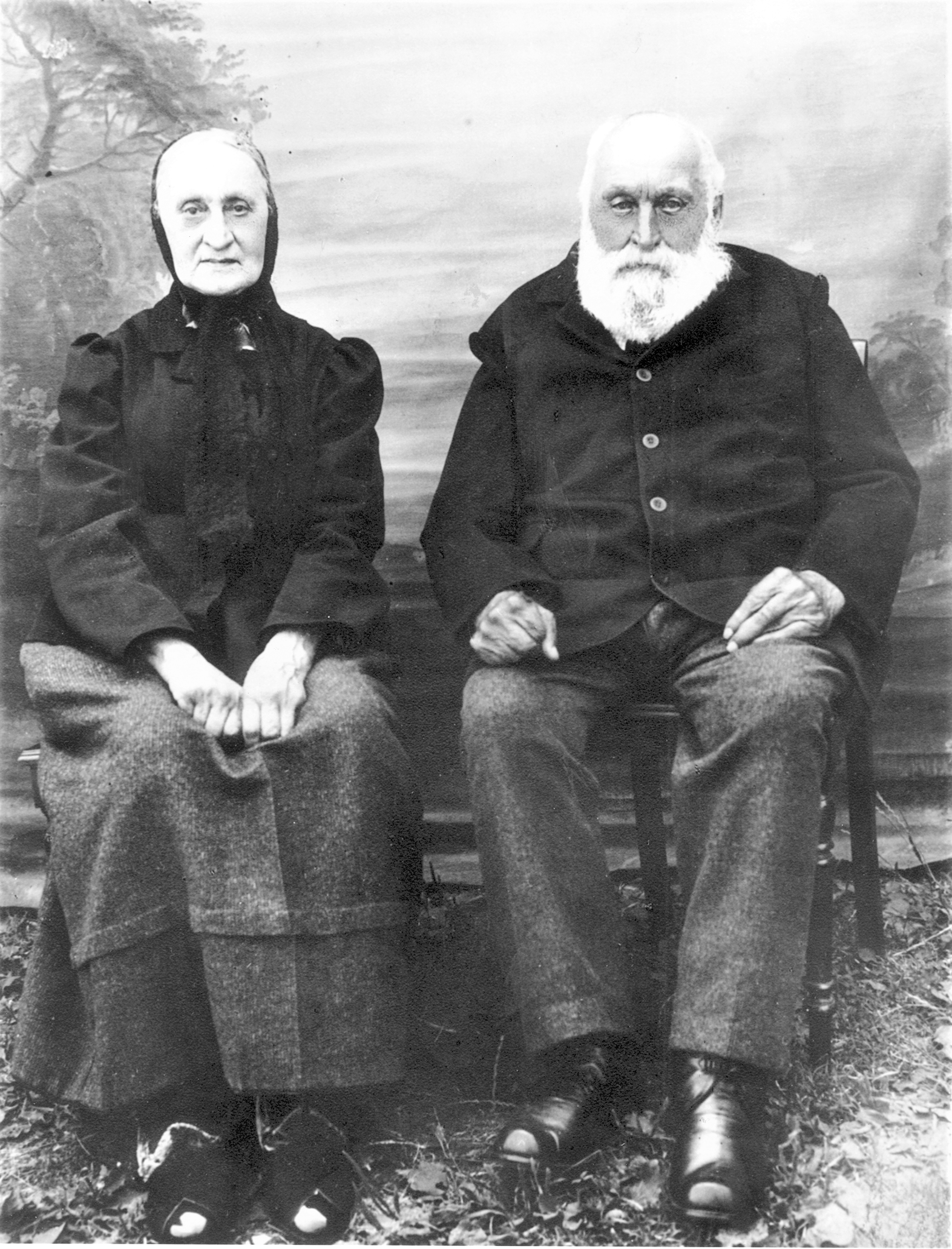 Philipp Scheitenberger der Jüngere war der Sohn des langjährigen Stadtschultheißen von Schelklingen Philipp Scheitenberger der Ältere und Kolonist und Landwirt im Siegental bei Almendingen. Neben ihm sitzt seine Frau Anna Maria Günter.